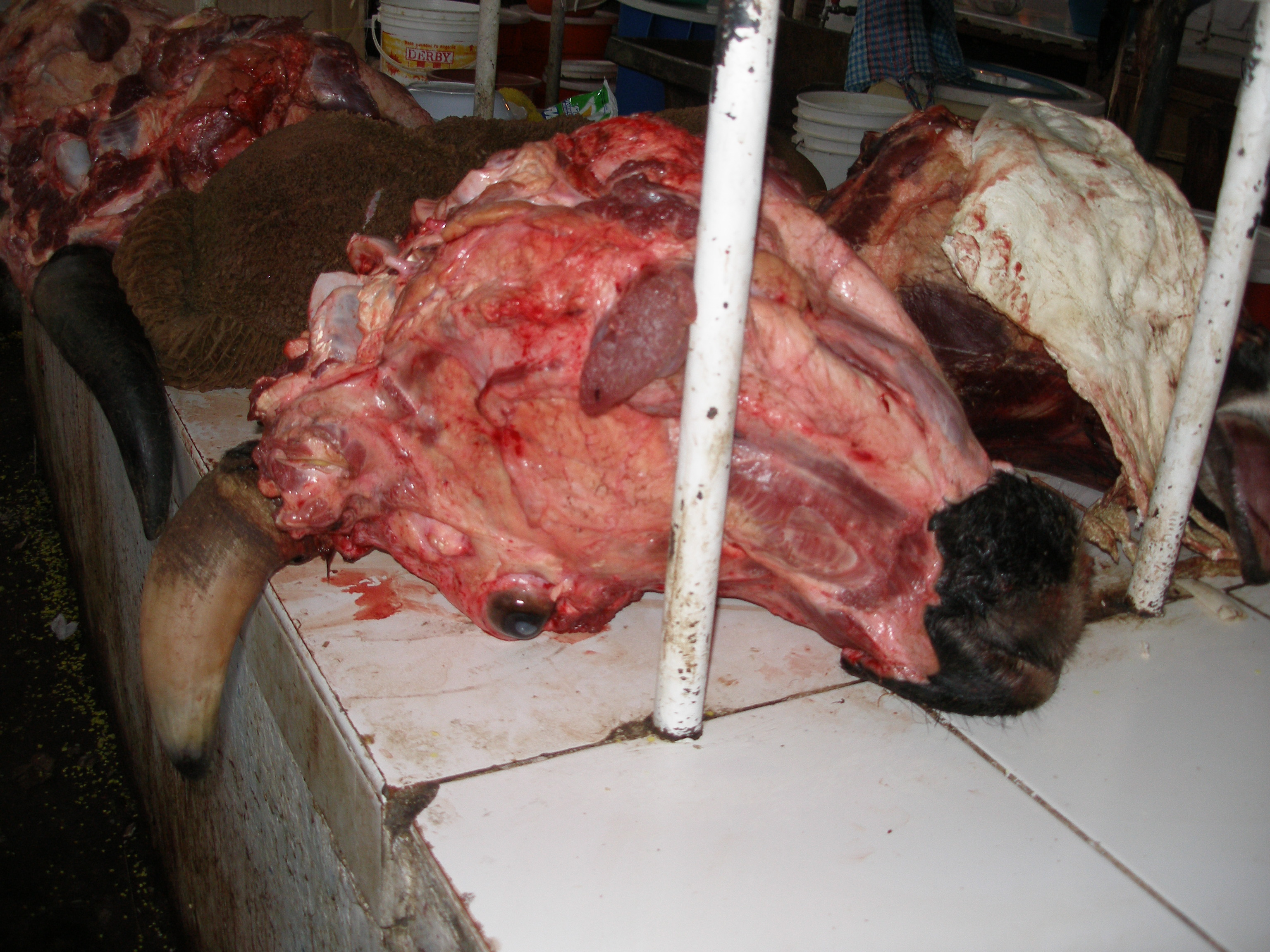 On sale in a Peruvian market